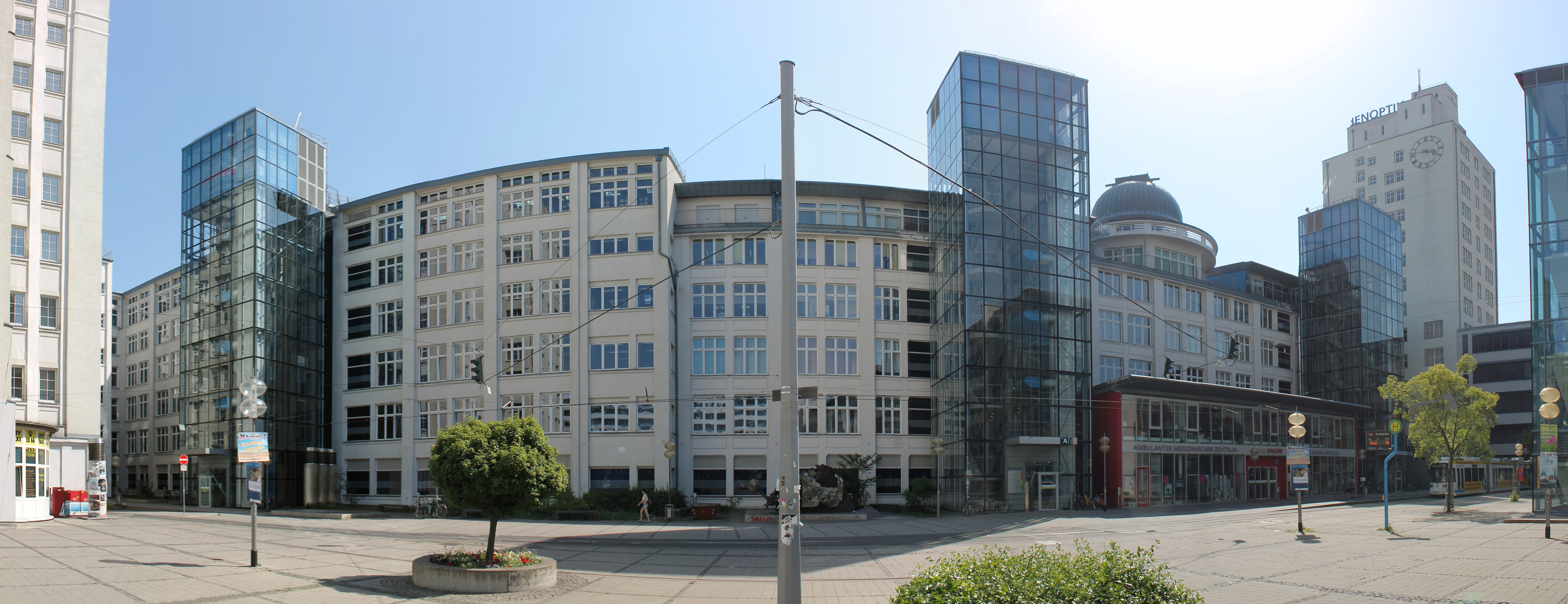 Die denkmalgeschützten Bauten 10, 13 und 36 des ehemaligen Zeiss-Hauptwerkes am Ernst-Abbe-Platz in Jena